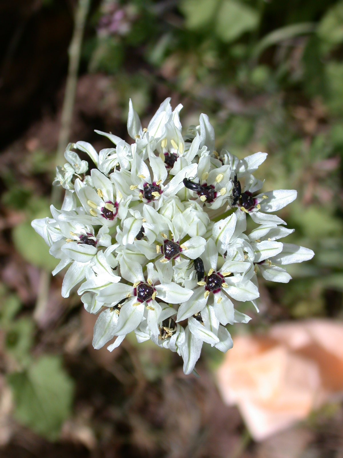 Allium meronense Fragman & R.M. Fritsch (שום הגליל), Upper Galilee, Israel, April 2008.